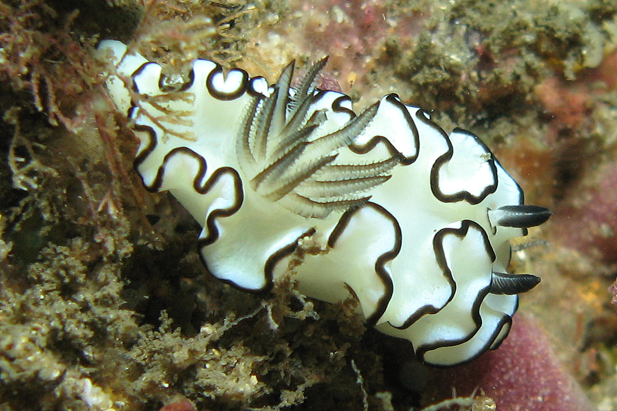 Doriprismatica atromarginata (Cuvier, 1804) (synonym: Glossodoris atromarginata)